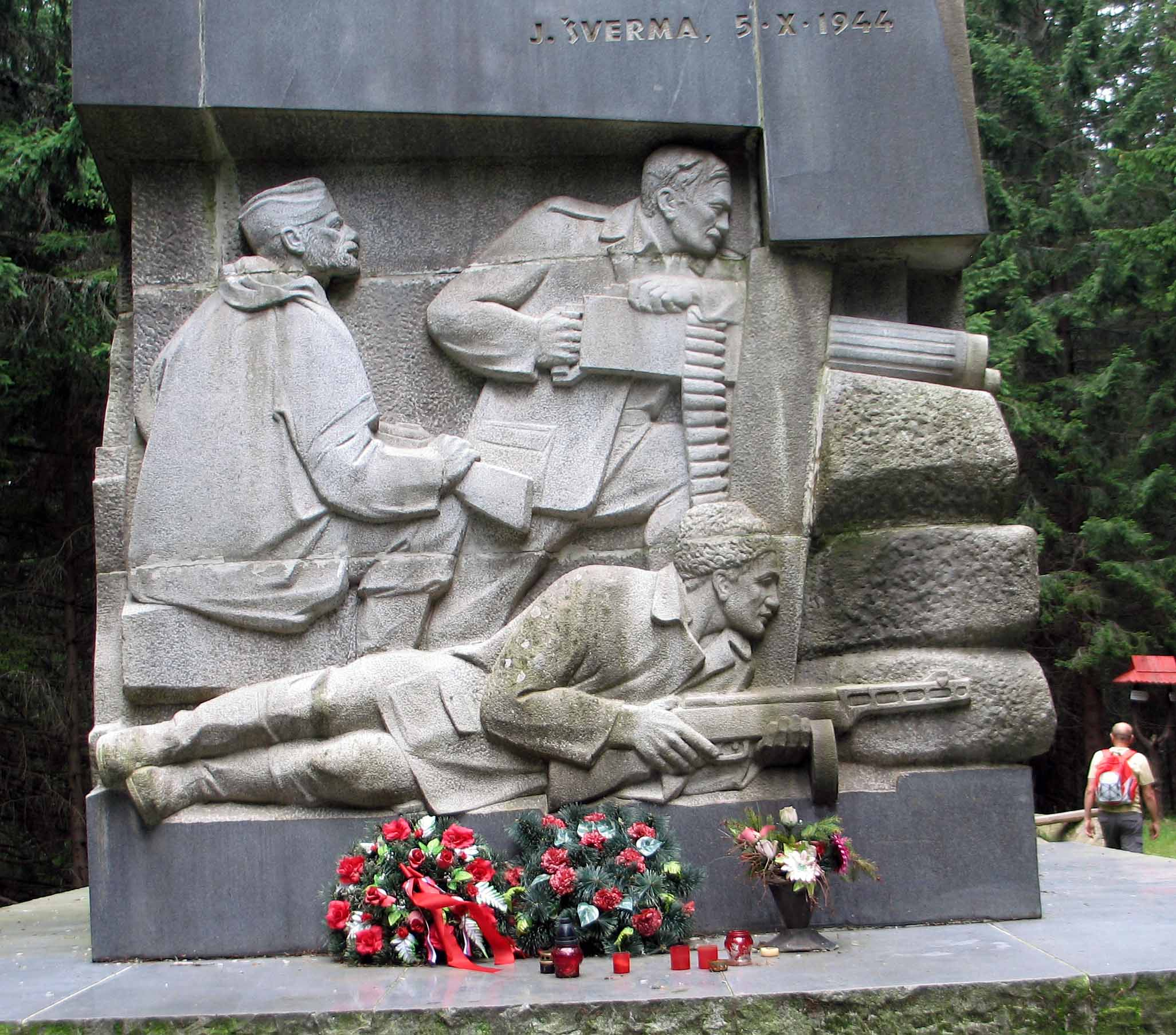 Reliéf z pamätníka SNP na Ostredku